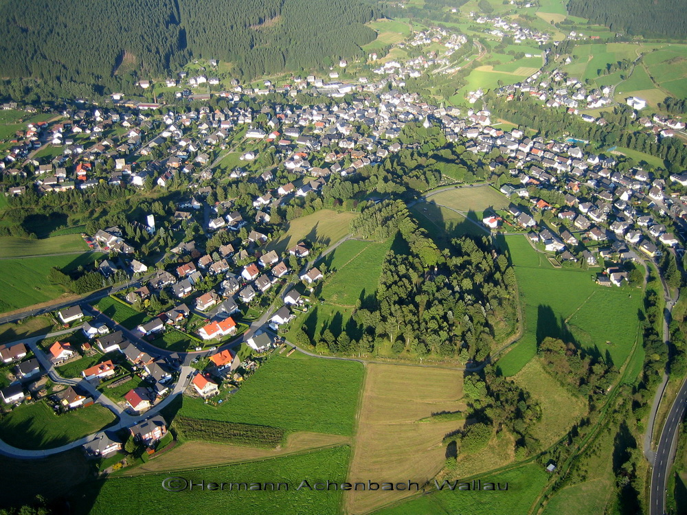 Ortsteil Feudingen